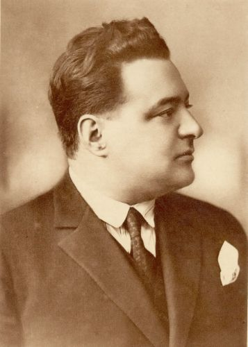 Igo Gruden (1893-1948)